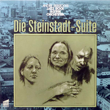 Cover für die bei Pläne erschienene CD "Die Steinstadt-Suite"